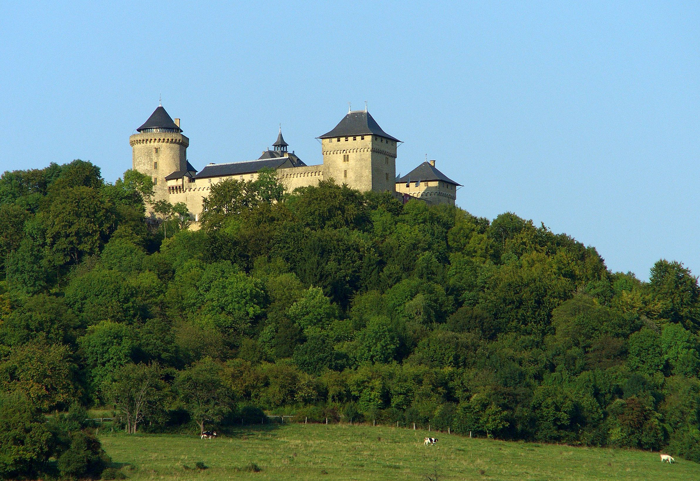 Château de Malbrouck